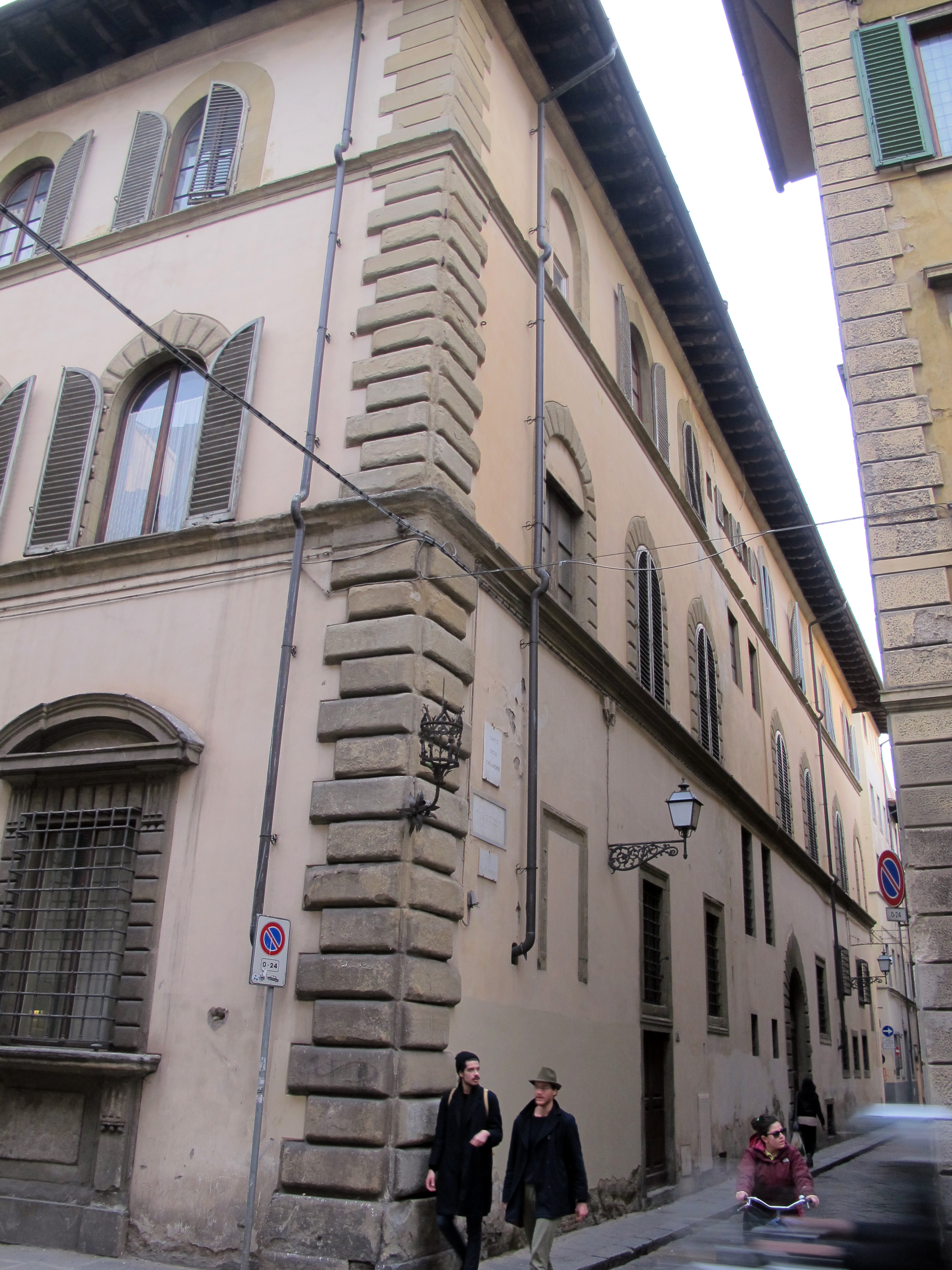 Palazzo Salvetti Sebregondi